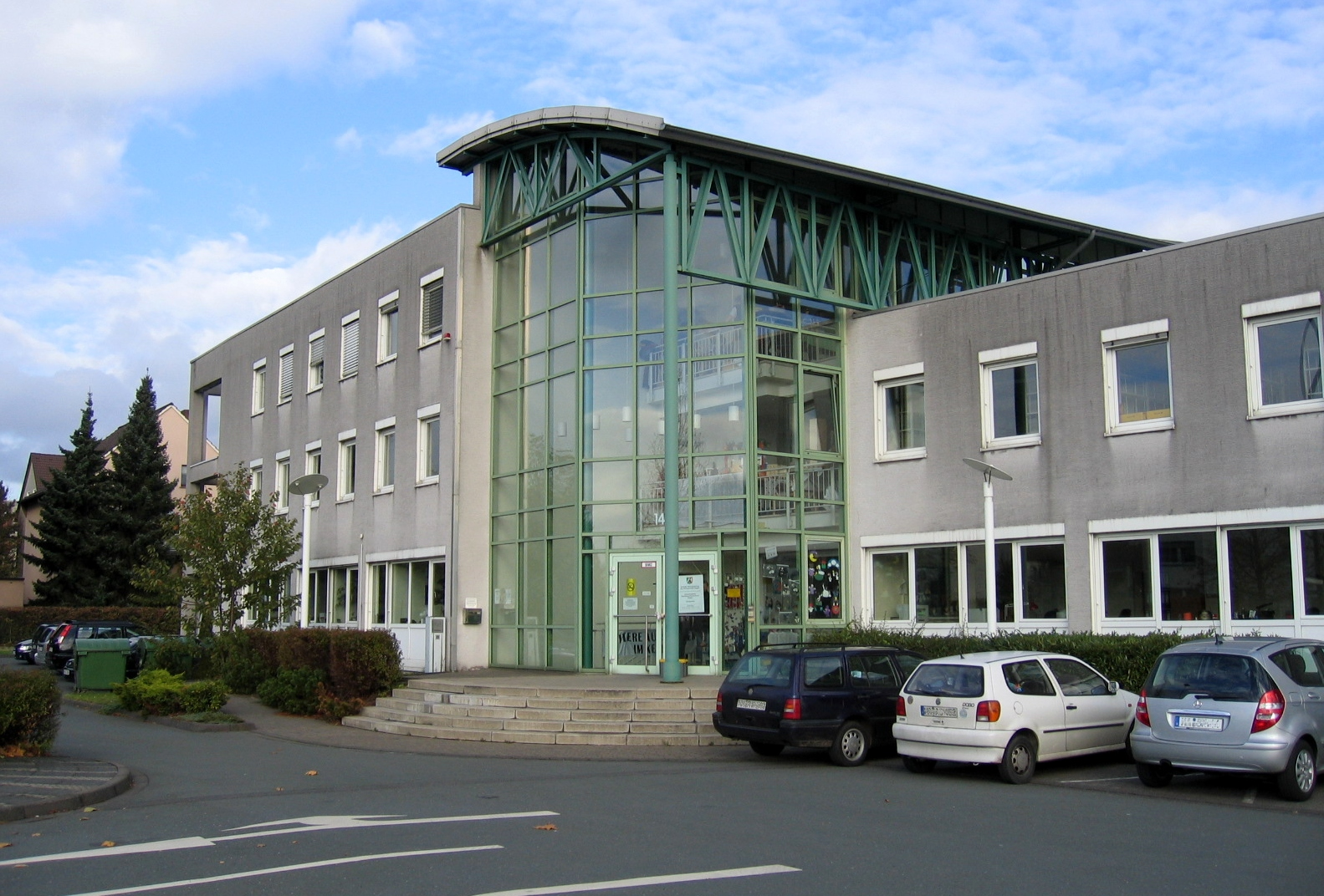 Description: Amtsgericht Hagen, Zentrales Mahngericht, Hagener Straße 145 in Hagen Source: selbst fotografiert Date: 5. Nov. 2005 Author: Bubo